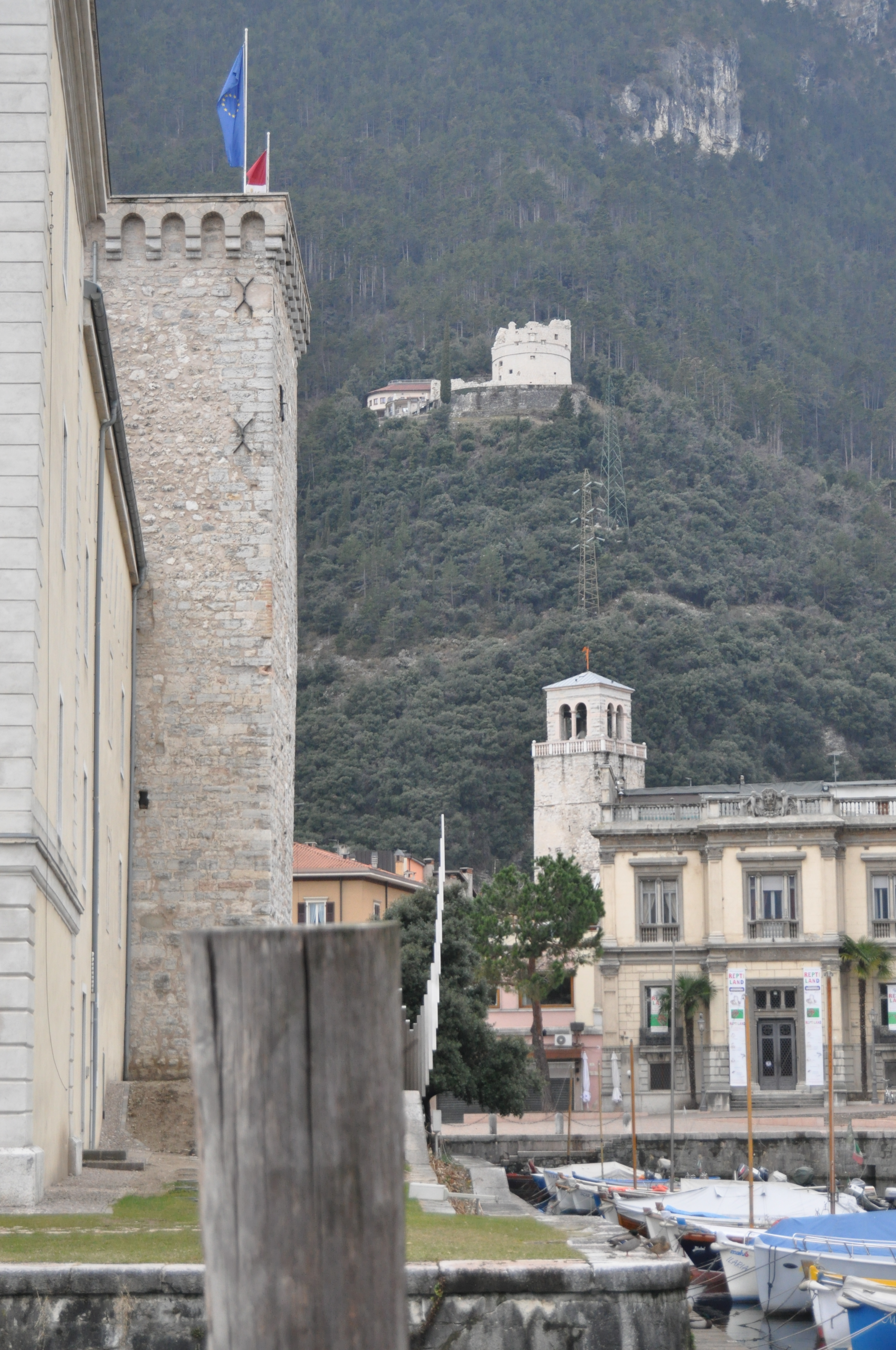 Bastione veneziano This is a photo of a monument which is part of cultural heritage of Italy.